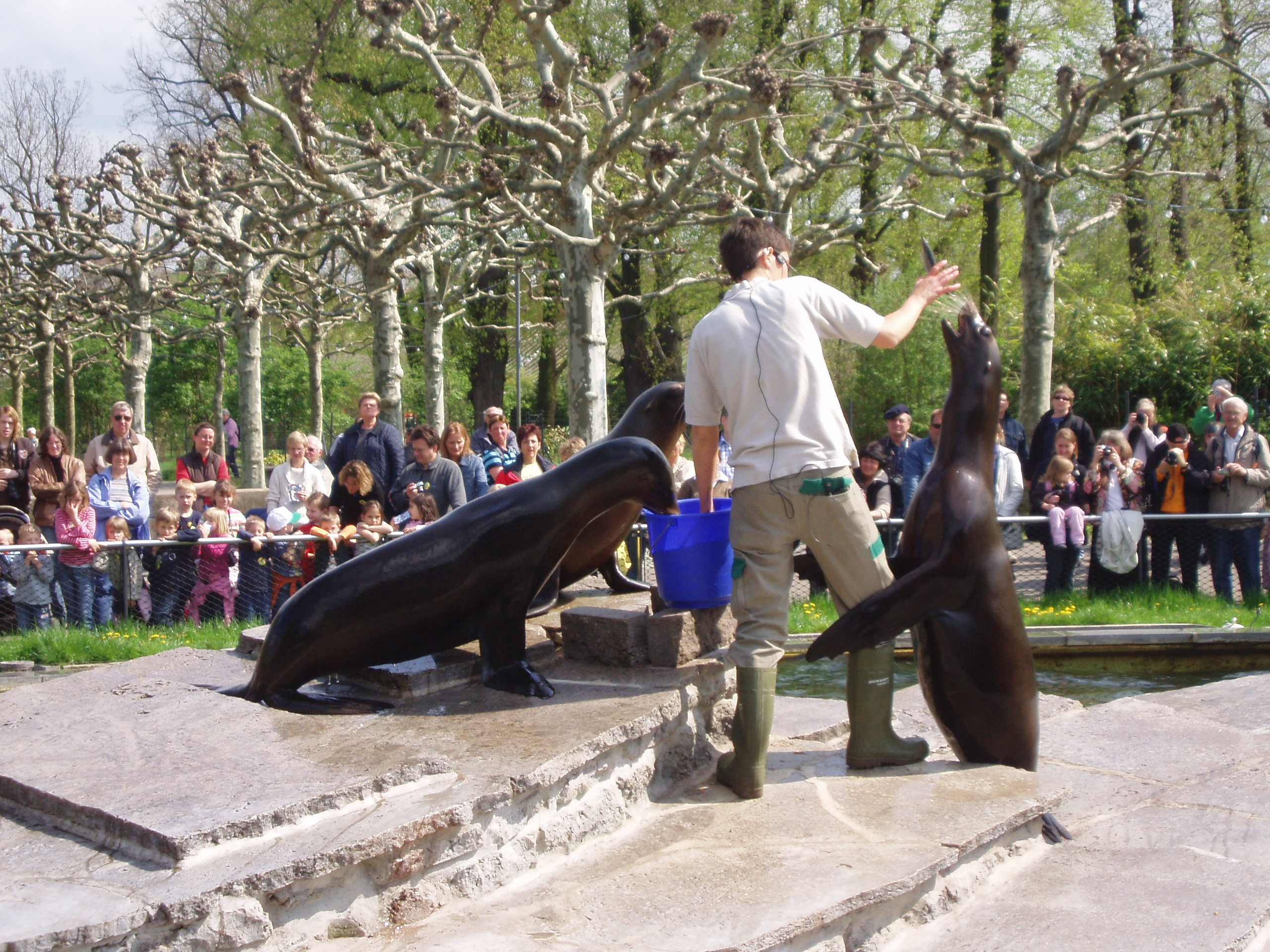 Seelöwenfütterung in der Wilhelma